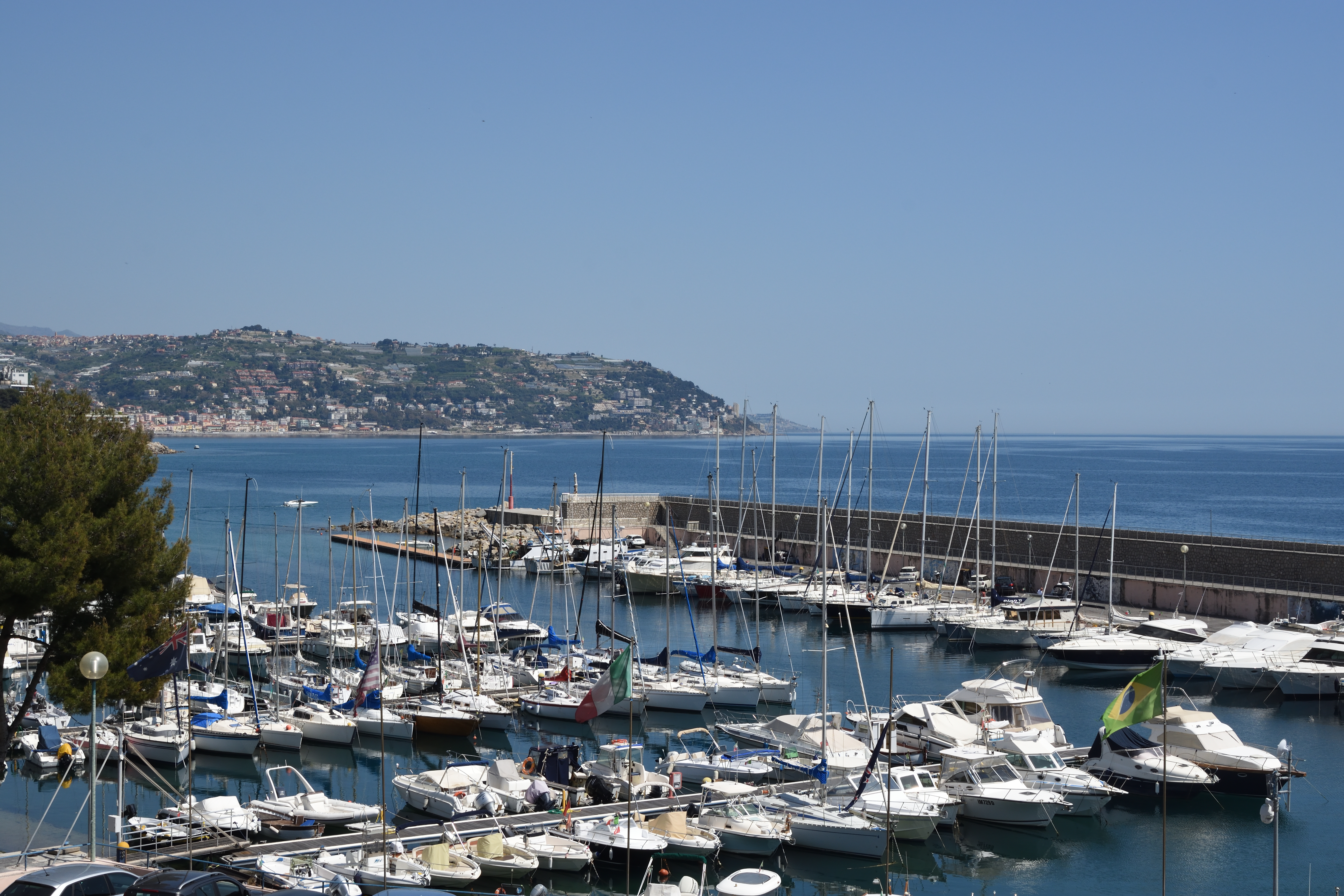 Il porto di Bordighera